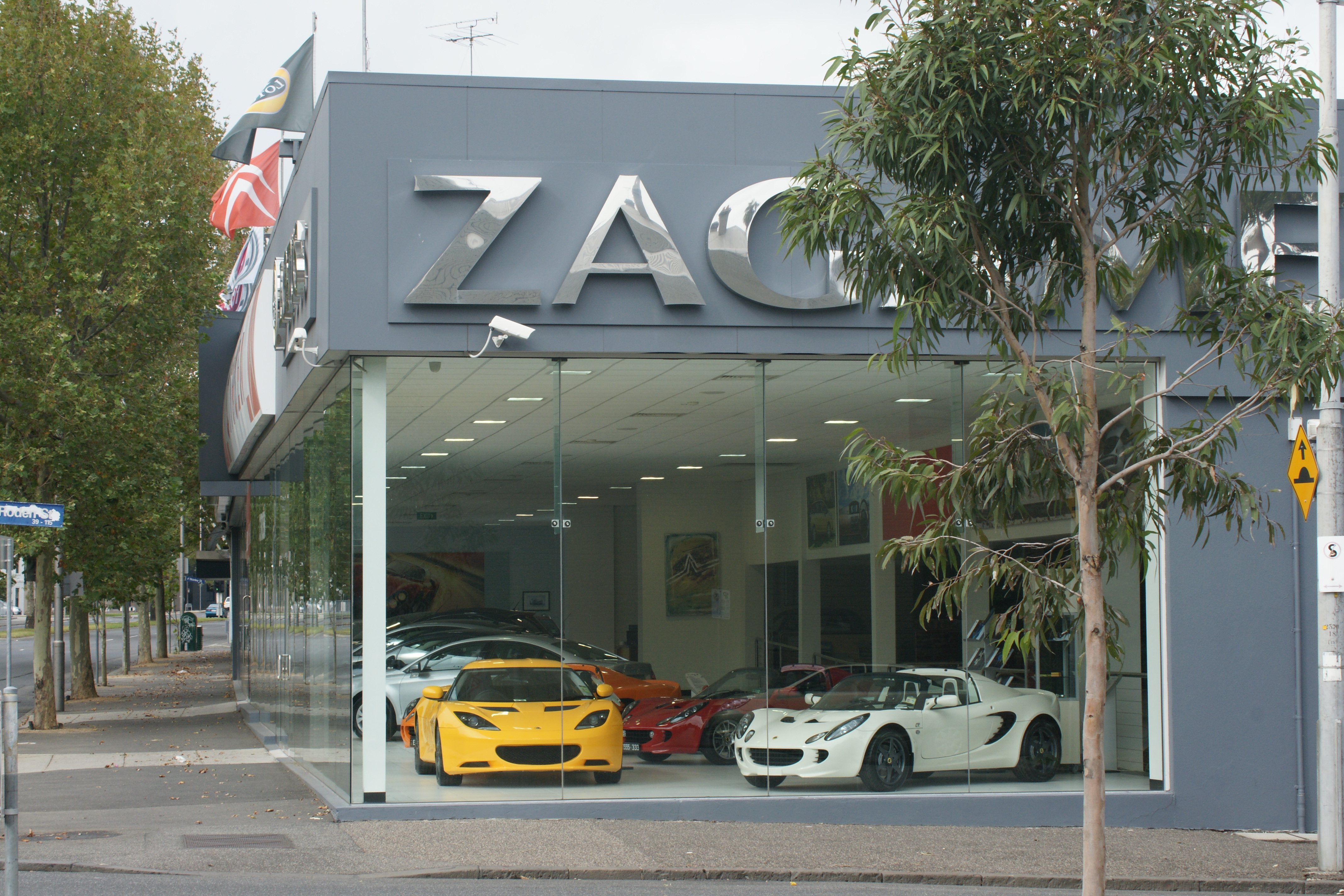 Lotus Melbourne